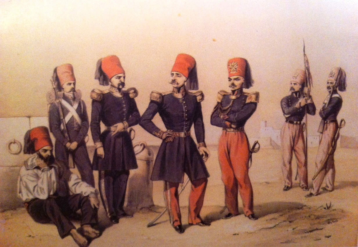 Gravure montrant des officiers et soldats d'infanterie de l'armée beylicale tunisienne avec, à droite, deux lanciers